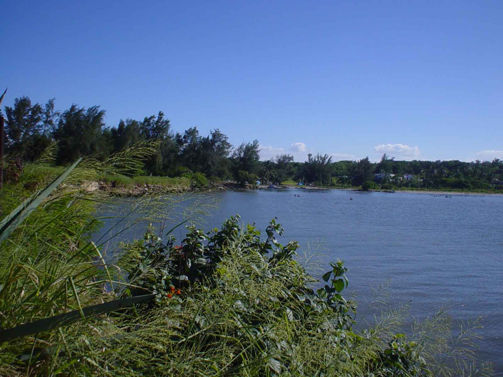 Bahia de Cojimar en Ciudad de la Habana